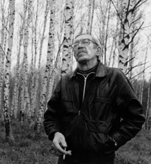 Porträt Igor Vulokh